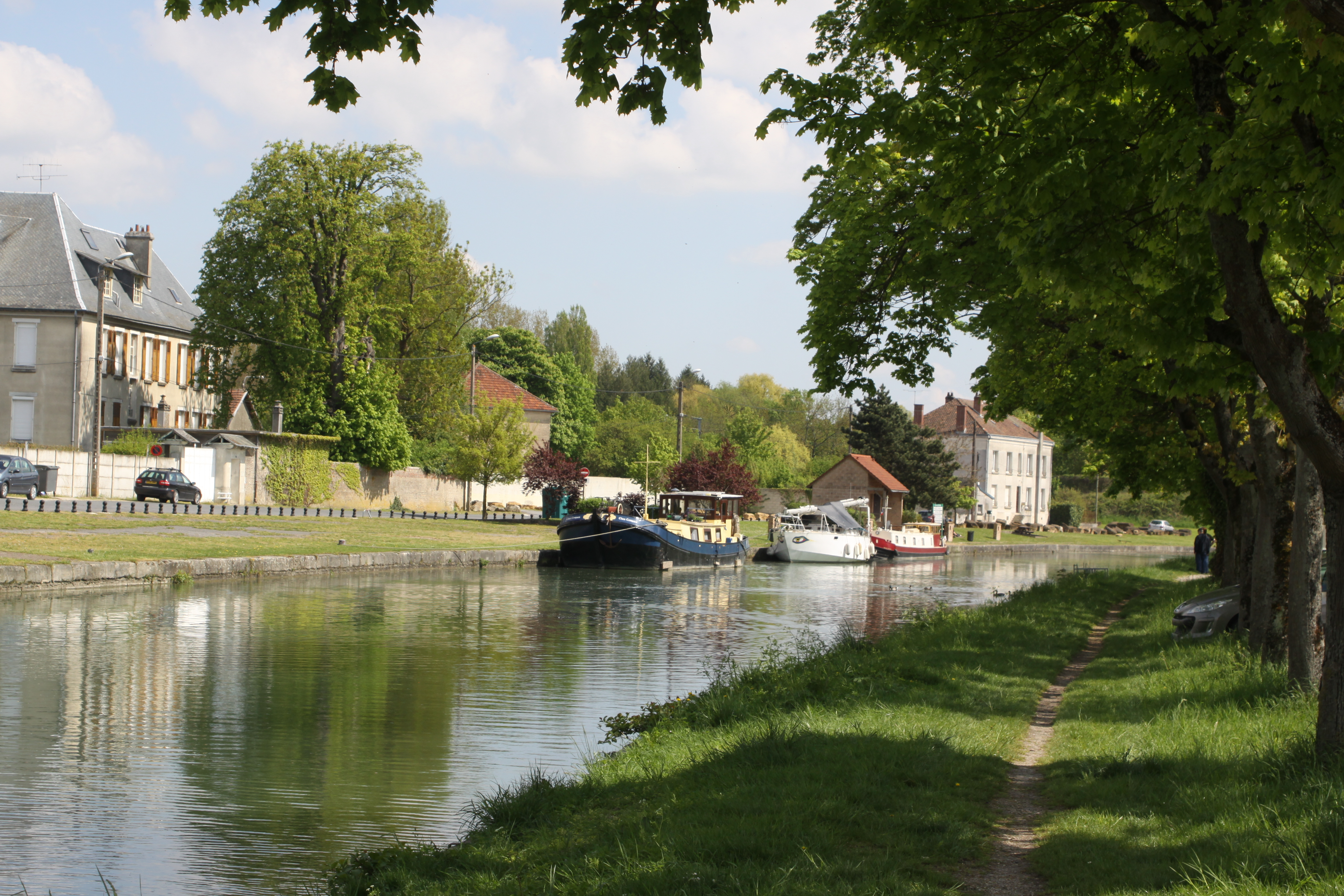 Canal des Ardennes zu Rethel